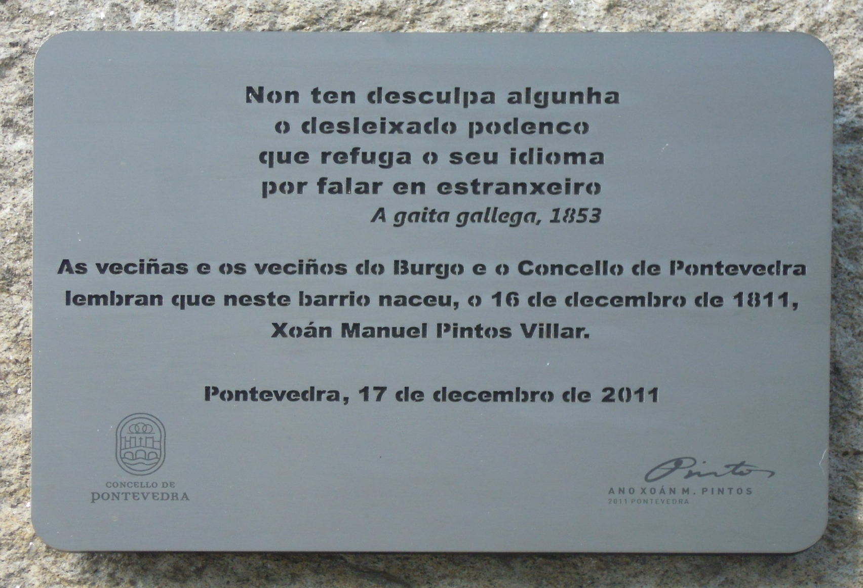 Placa na casa en que naceu Xoán Manuel Pintos no Burgo (Pontevedra), na rúa da Santiña. Inclúe un texto d' A gaita gallega.